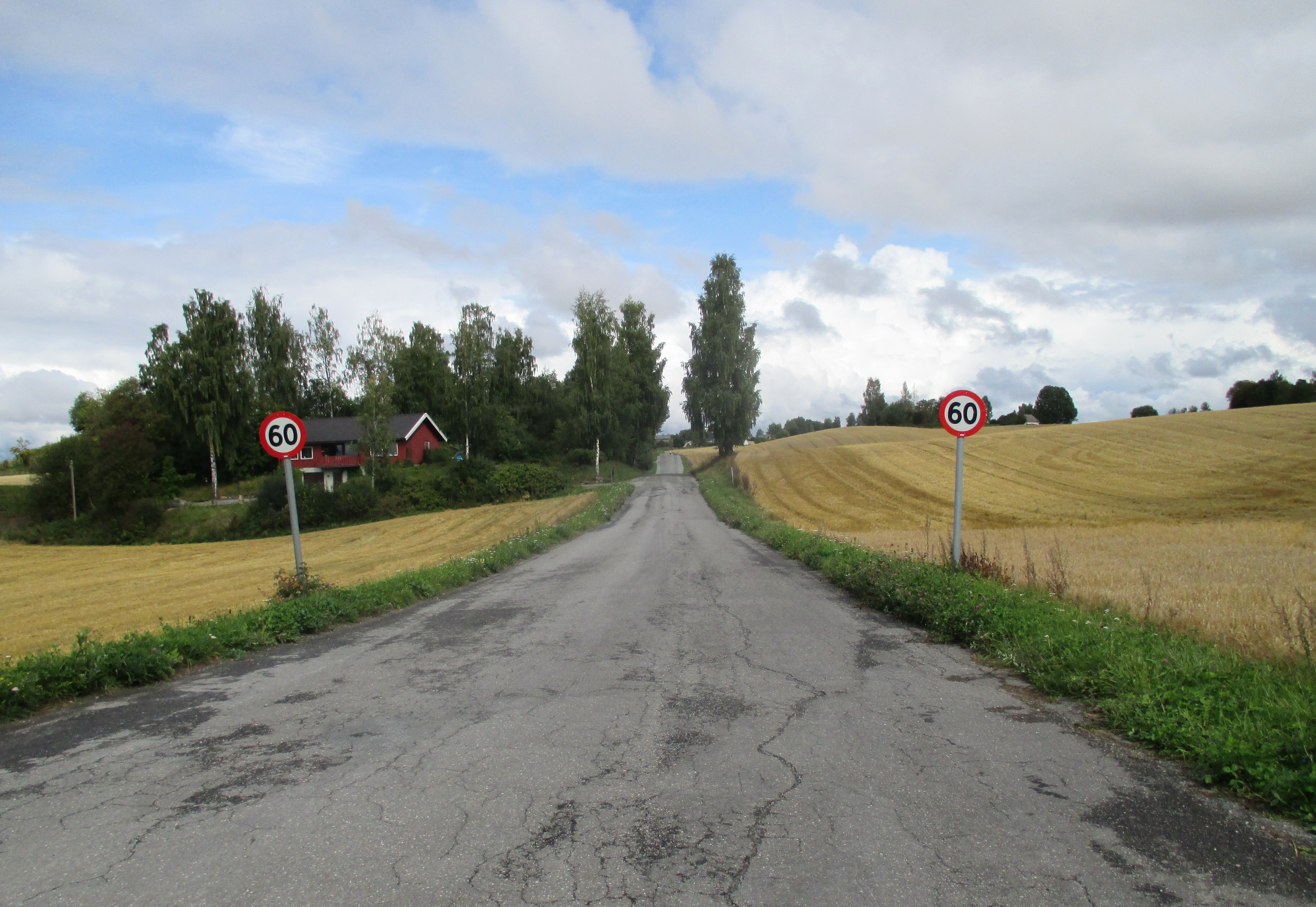 Grimerudvegen (FV1860, tidl. FV196) nær enden ved Vestbygdvegen (FV1856)